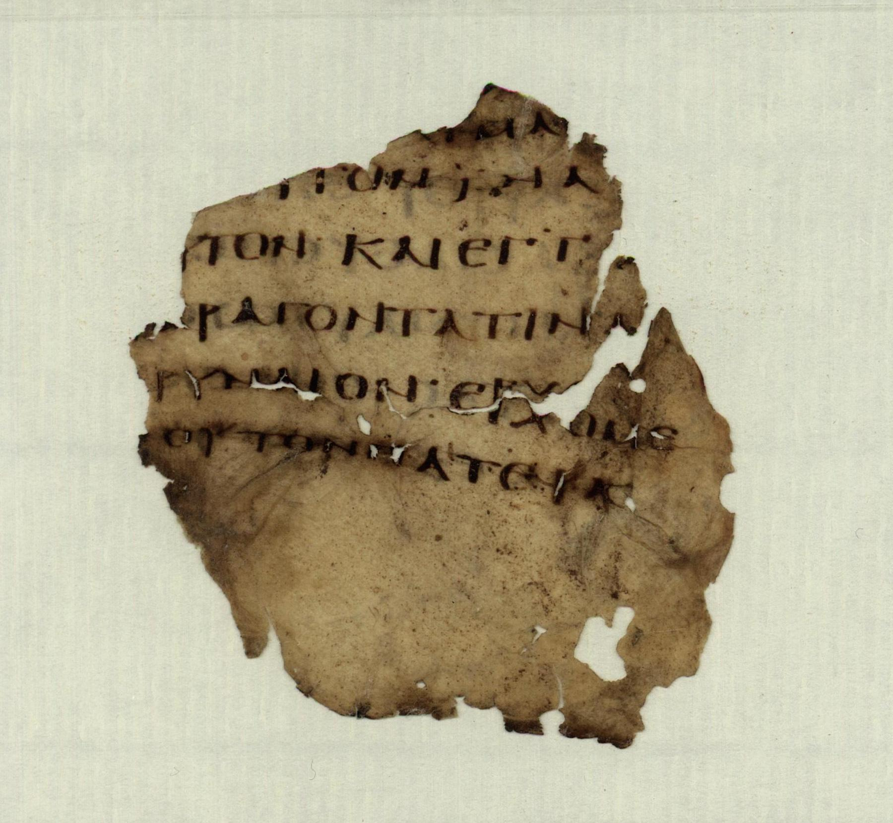 fragment with text of Matthew 15:20-21